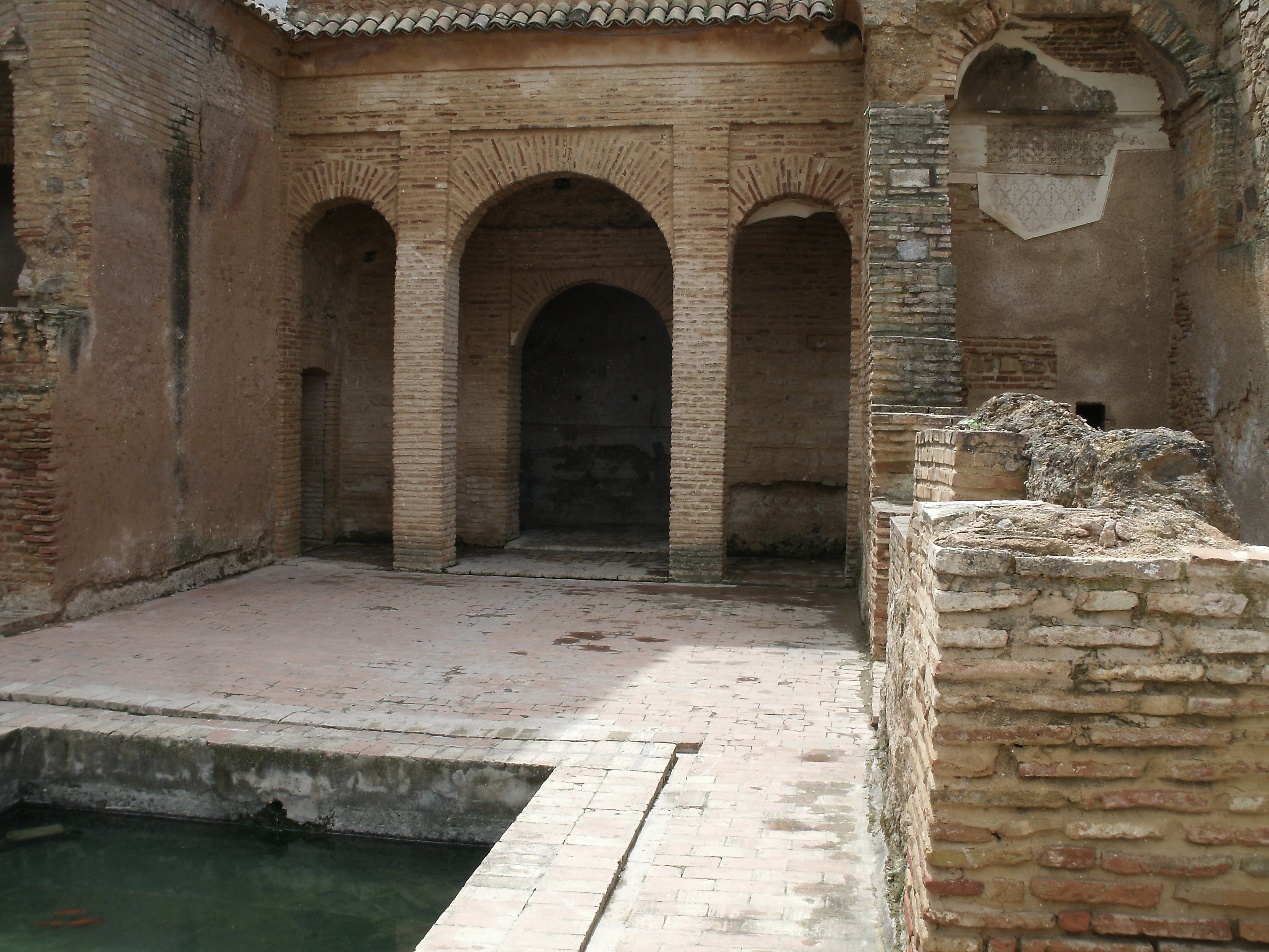 Vestiges du palais du complexe Sidi Boumediene à Tlemcen